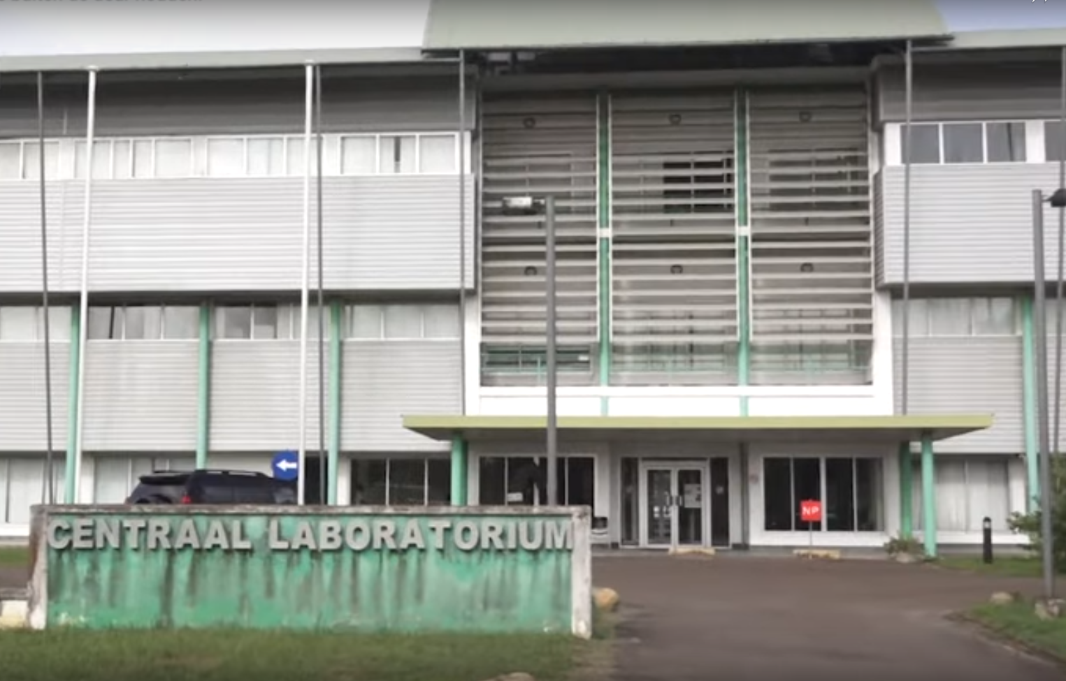 Centraal Laboratorium van het Bureau Openbare Gezondheidzorg in Suriname